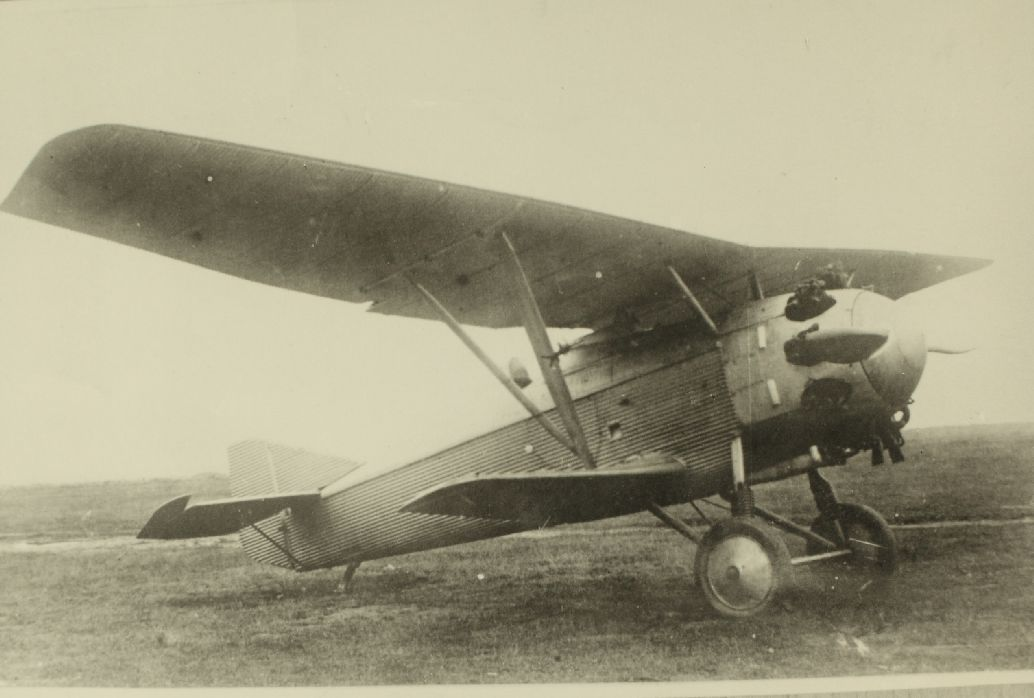 Tupolev I-4 (ANT-5)